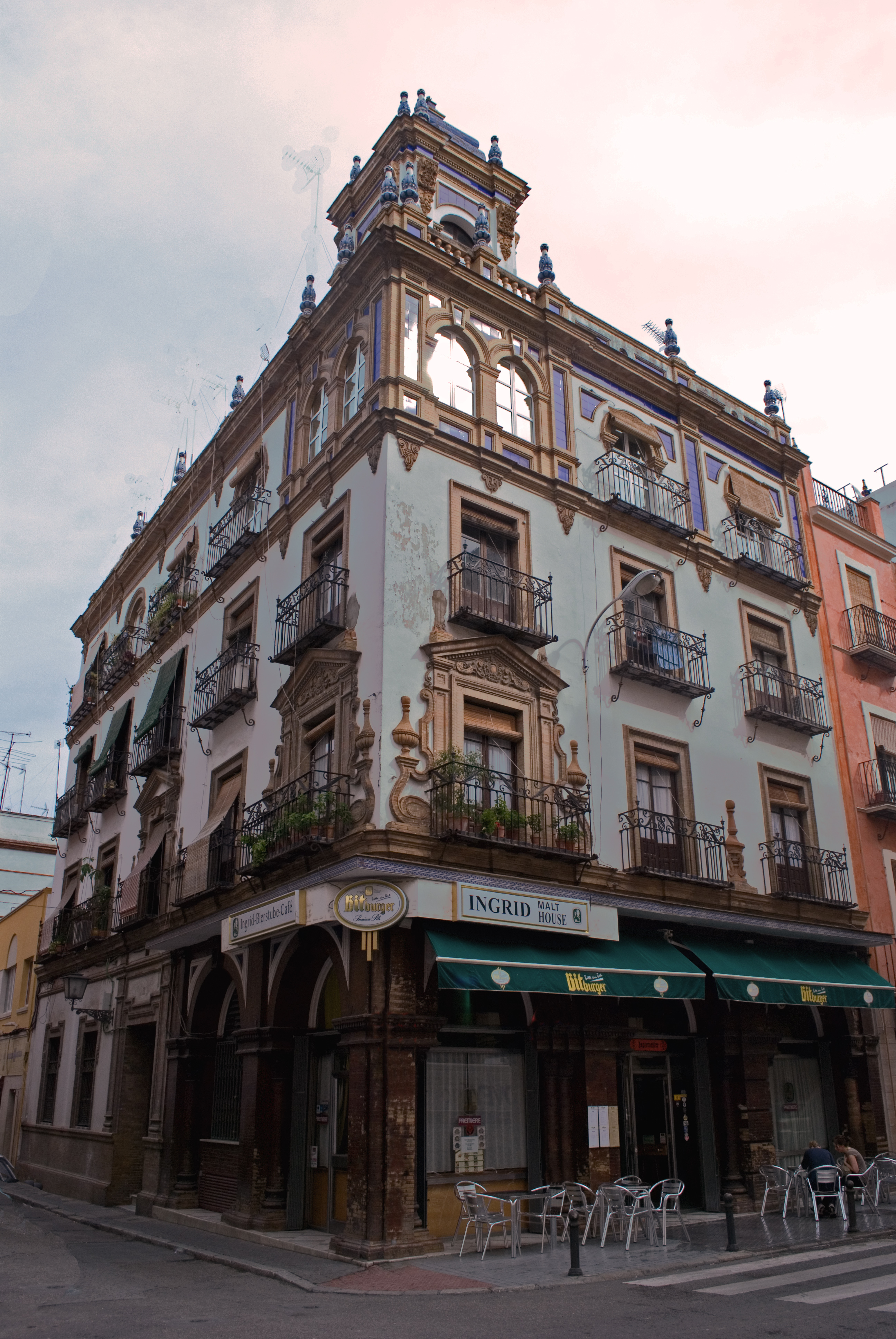 Casa de viviendas de Anastasio Martín Serrano, calle Almansa esquiina Pastor y Landero, Sevilla, 1925-1926. Arquitecto Juan Talavera y Heredia